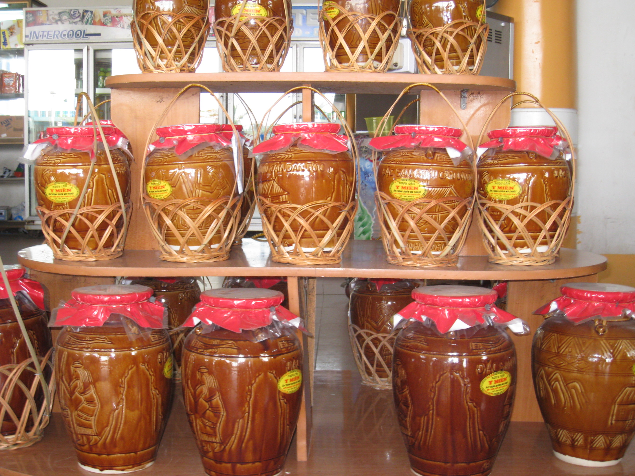 Rượu cần in a shop in Vung Tau, Vietnam